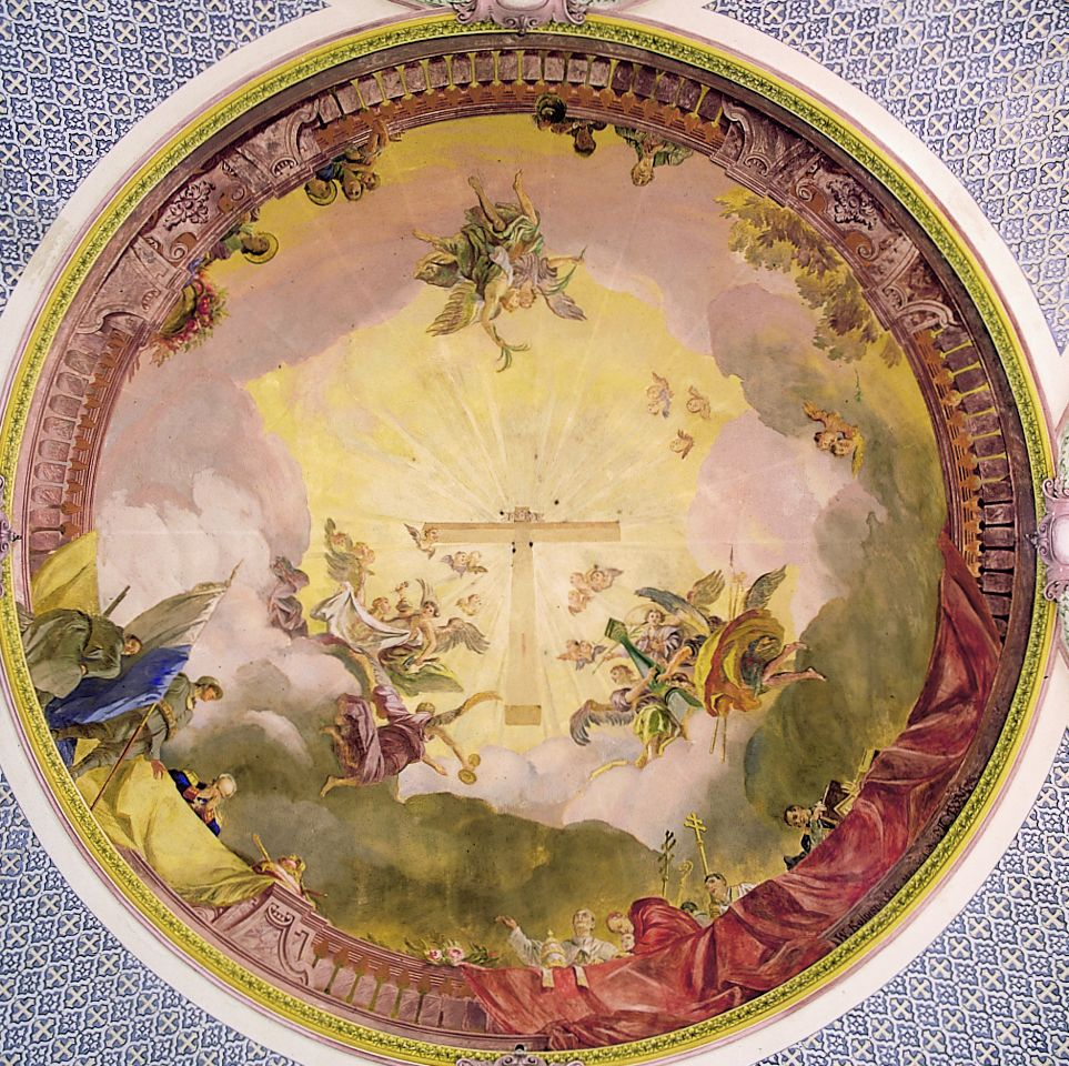 Triumph des Kreuzes mit zeigenössischen Personen (König Ludwig III., Papst Pius XI., Kardinal Faulhaber, Pfarrer Gierl